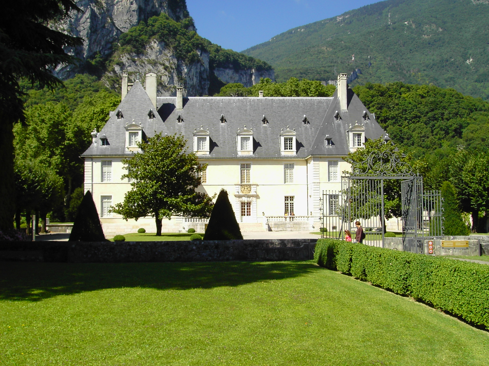 château de Sassenage, France